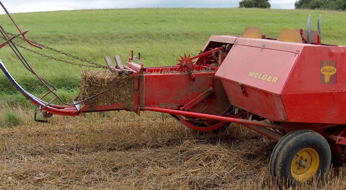 Welger ballepresse set bagfra. Der er monteret opføringsbane der kan lede ballerne op i en påspændt vogn